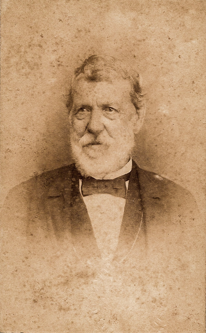 Francisco de Pinho Borges Barão de Pinho Borges.